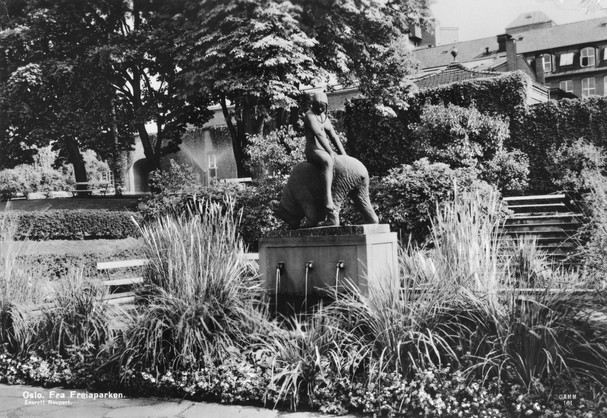 Fra Freiaparken: fonteneanlegg med «Piken på bjørnen», skulptur av Gustav Vigeland. Foto: Hermann Neupert, ca. 1935. Fra Oslo Museums samling.